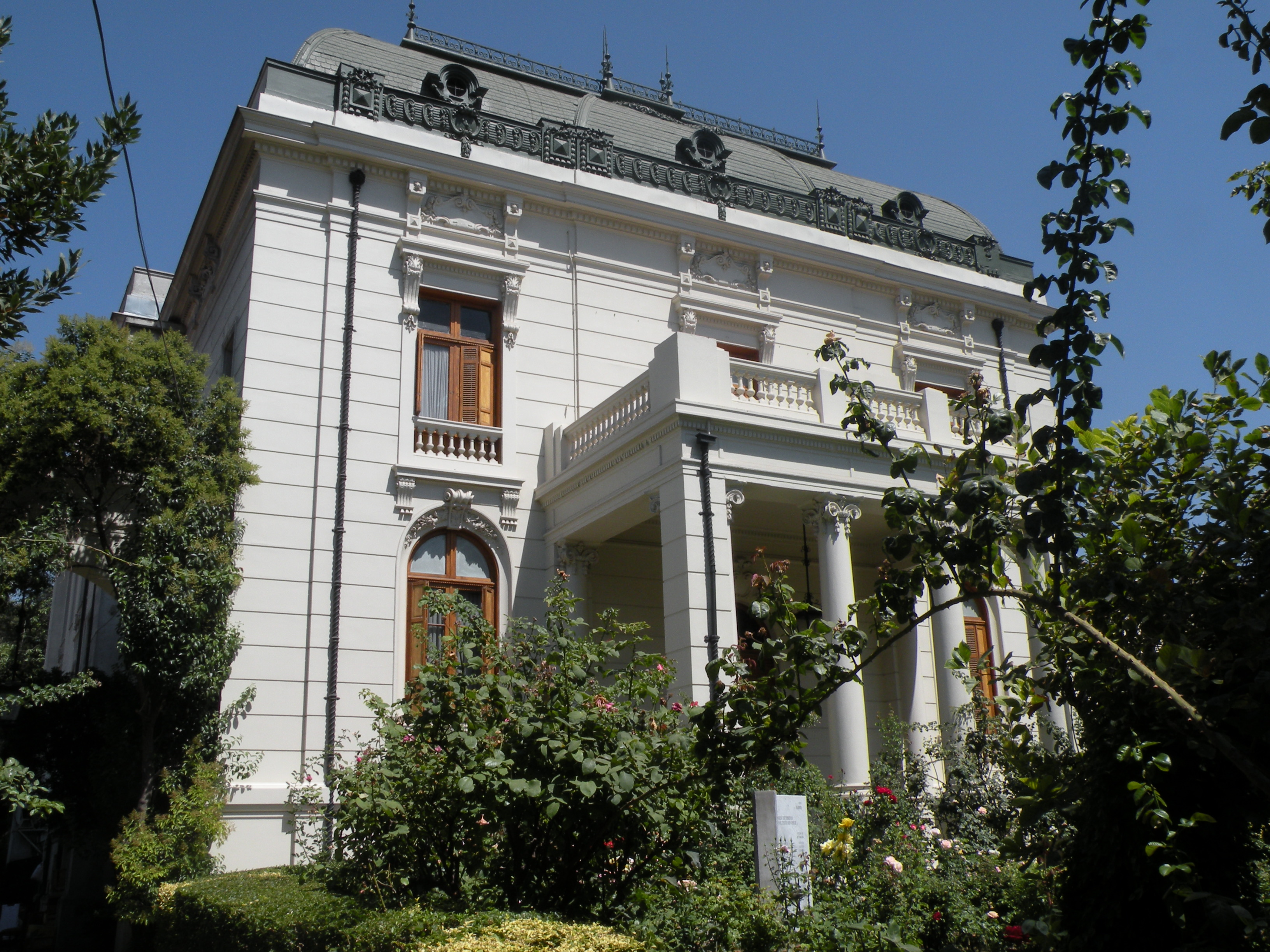 Palacio Astoreca, actual Colegio de Contadores de Santiago.